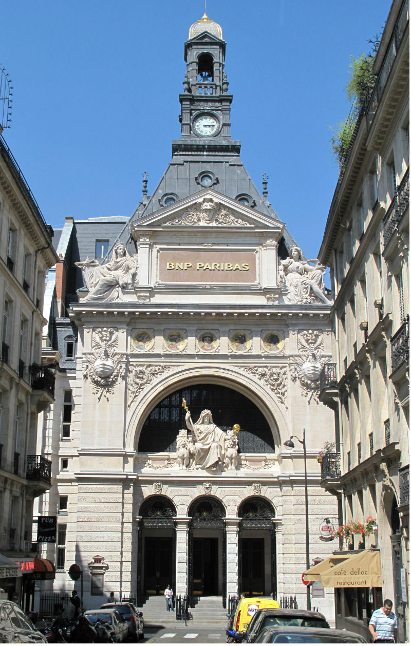 Siege BNP Paribas Investment Partners et ancien siège CNEP (Siège historique BNP Paribas)